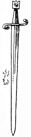 Рис. 277. Итальянский кавалерийский меч (т.н. скявонеска), с «лапчатым» навершием и S-образной крестовиной. Кон. XV в.